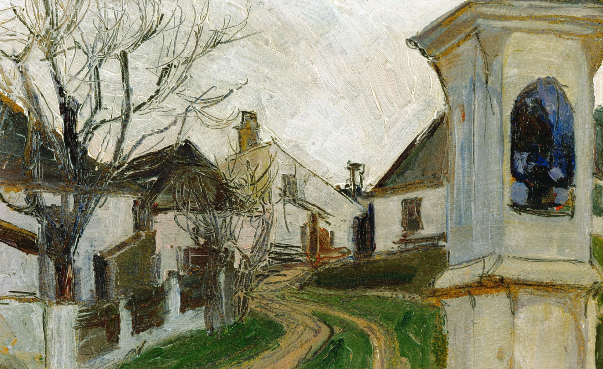 Klosterneuburg, Austria